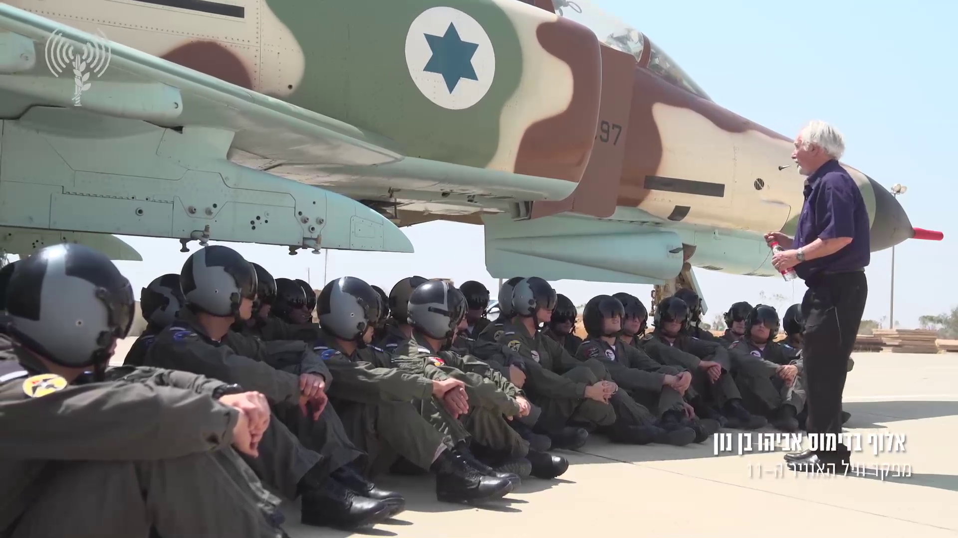 תמונות מקורס טיס 178.